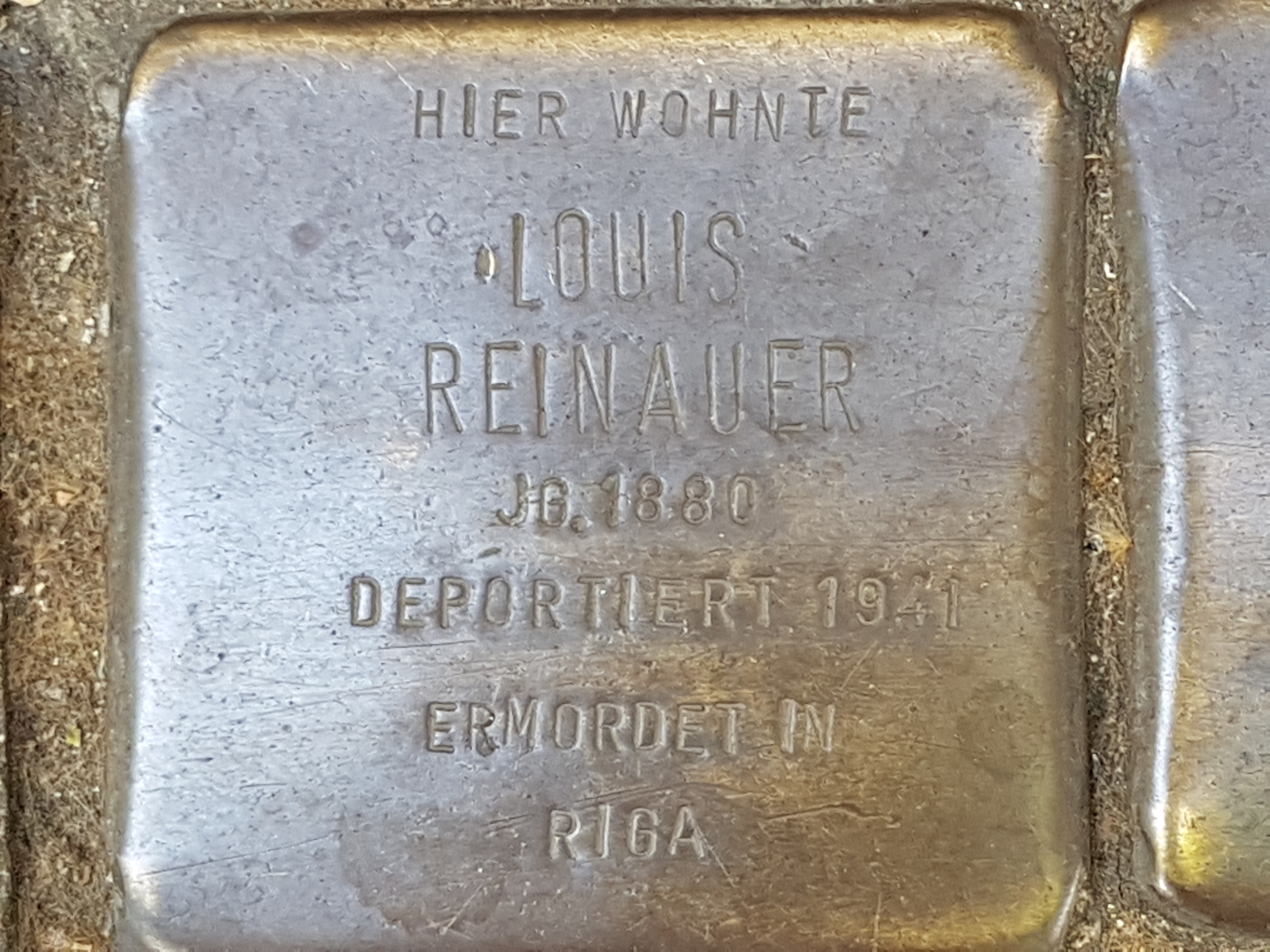 Stolperstein Duisburg